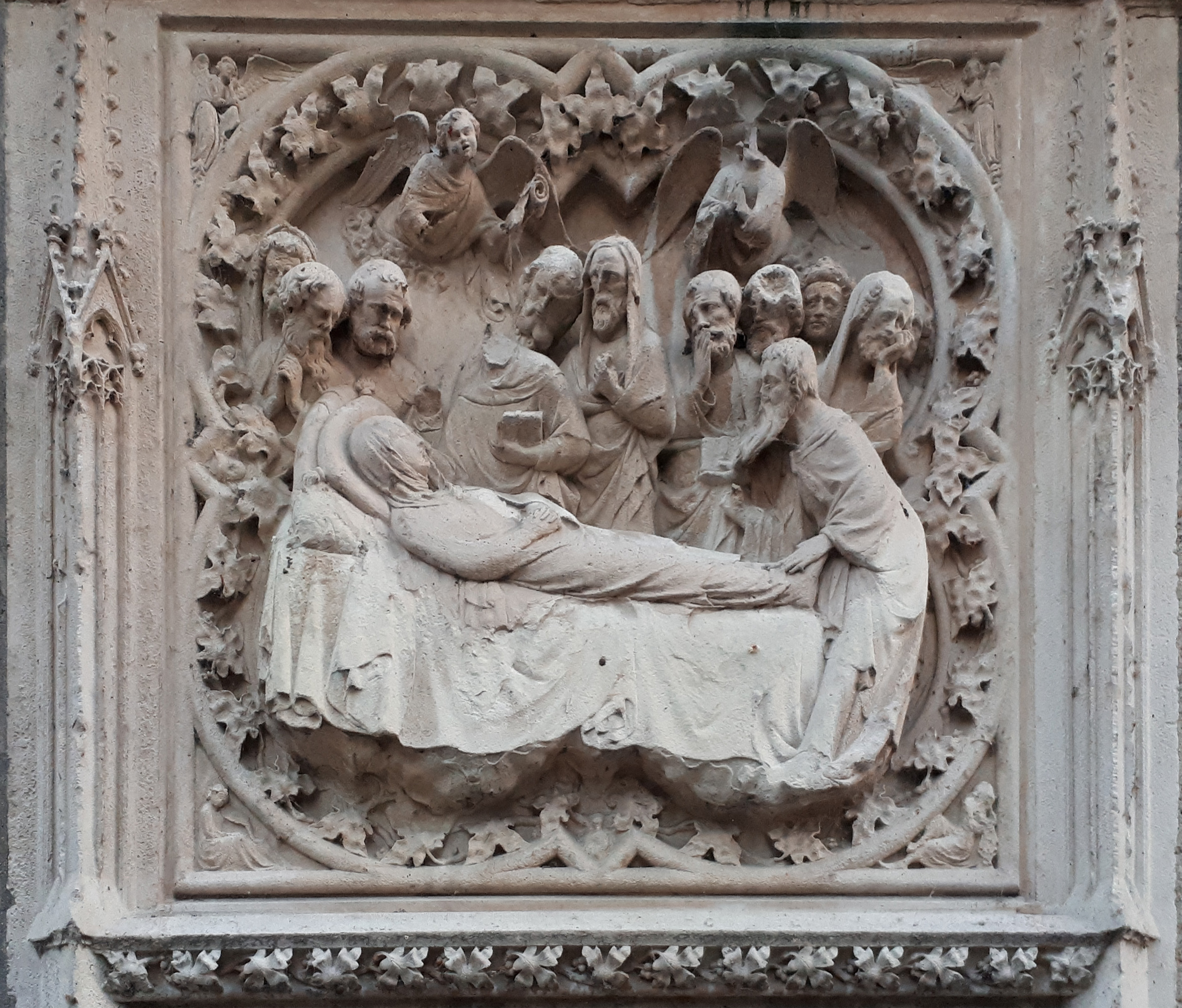 La morte della Vergine.